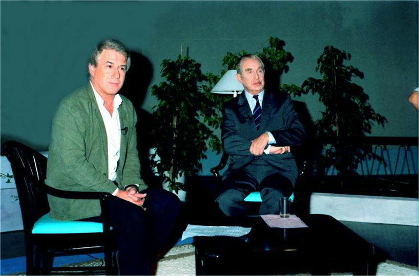 אהוד מנור והנשיא חיים הרצוג בתכנית "מסך אישי"